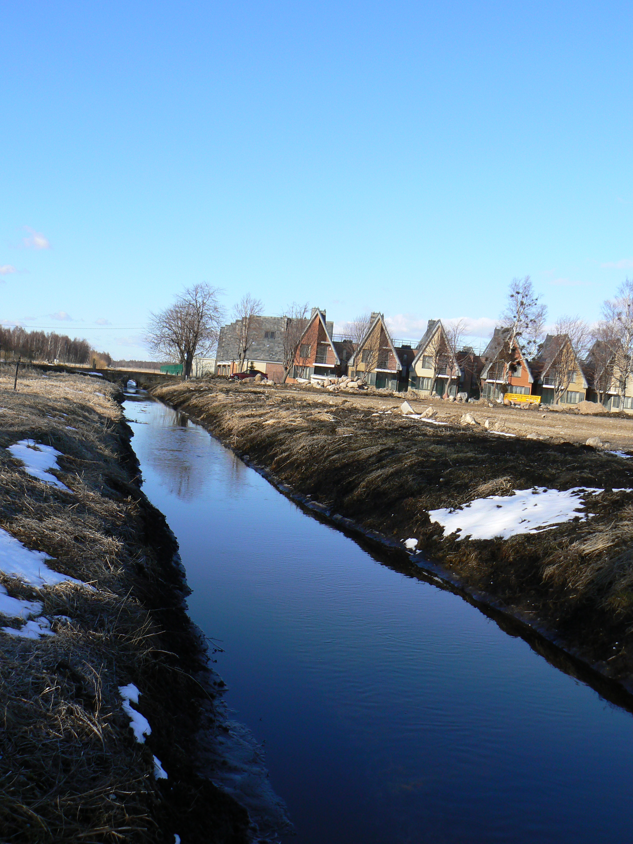 Ošupis na horním toku u vsi UžkaniavaiLietuvių: Ošupis ties Užkaniavais